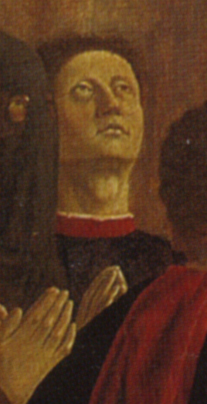 Piero della francesca, madonna della misericordia, autoritratto di piero